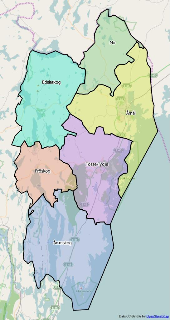 Distriktsindelningen i Åmåls kommun World file 90.23848013824738246 0 0 -90.23848013824738246 1377329.25726093980483711 8223320.19223249331116676